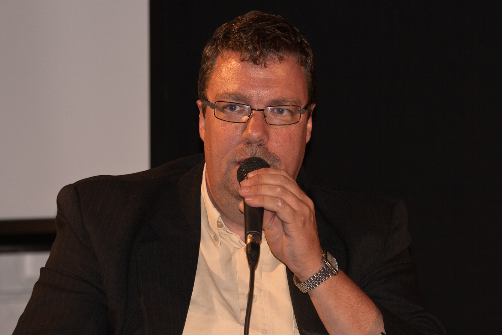 Ralf Grabow auf einer Podiumsdiskussion der "Jugen Kirche" in Rostock. Ebenso Anwesend waren die Spitzenkandidaten zur Bundestagswahl 2009 der Parteien CDU, Die.Linke, die Grünen und der Piratenpartei